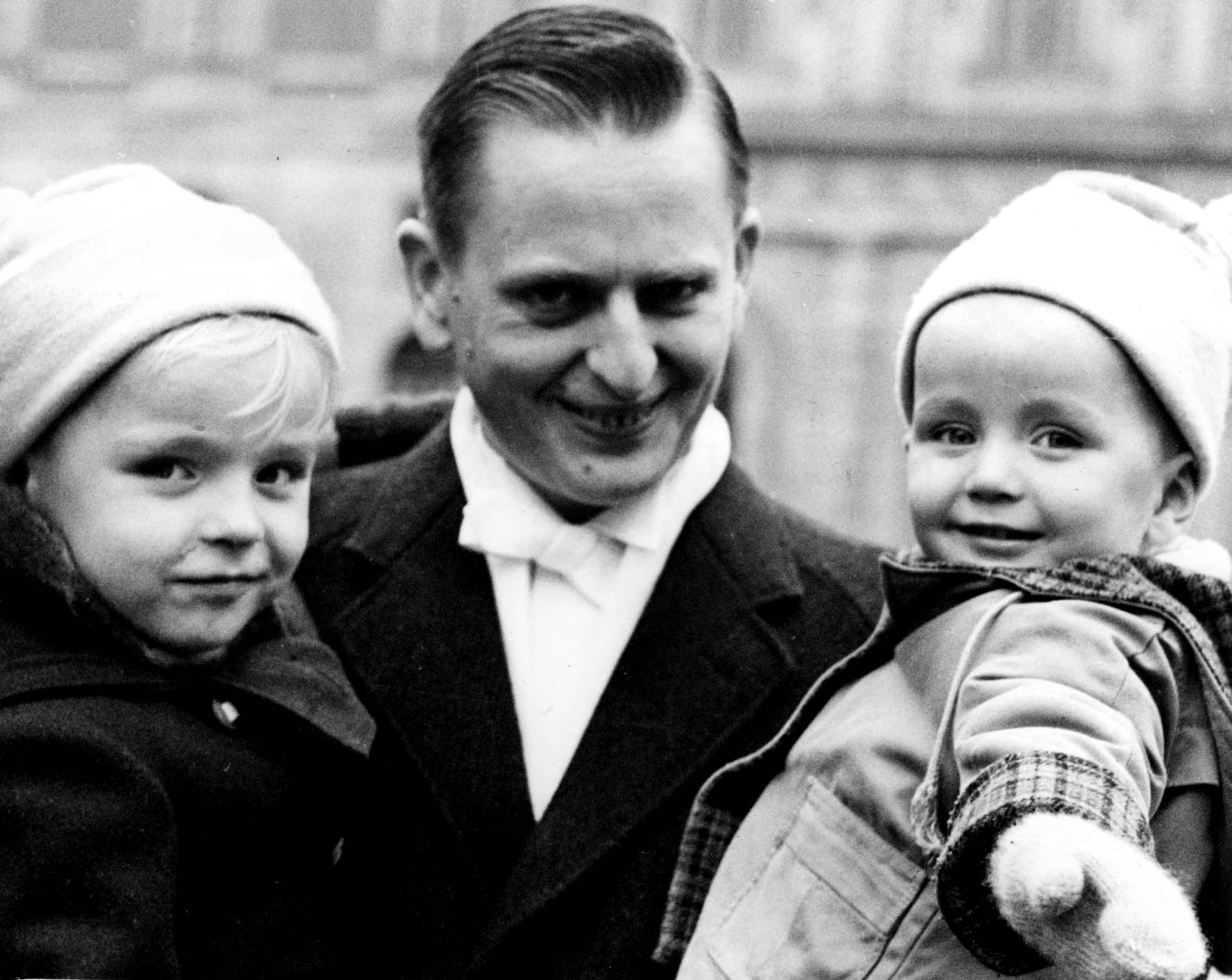 Olof Palme utnämndes i måndagens konselj till konsult. Statsrådet Palme med barnen Joakim och Mårten som mötte pappa på Slottet efter konseljen.